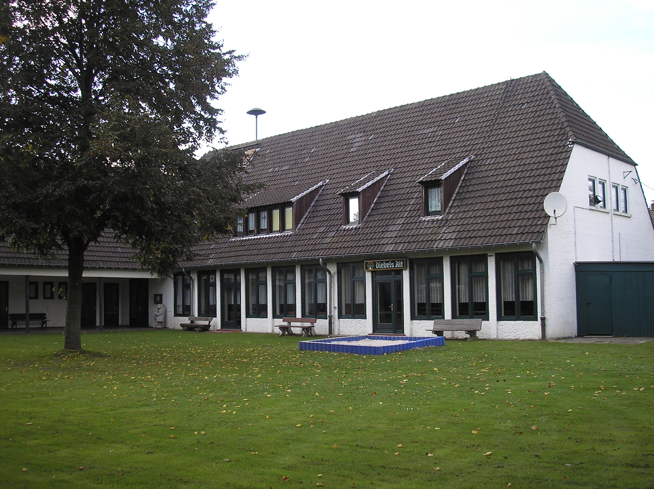 Das alte Schulgebäude und heutige Bürgerhaus von Schottheide, Gemeinde Kranenburg.